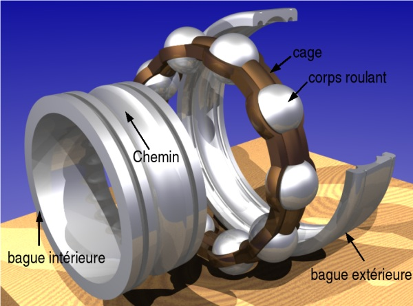 Ball bearing (rendered)